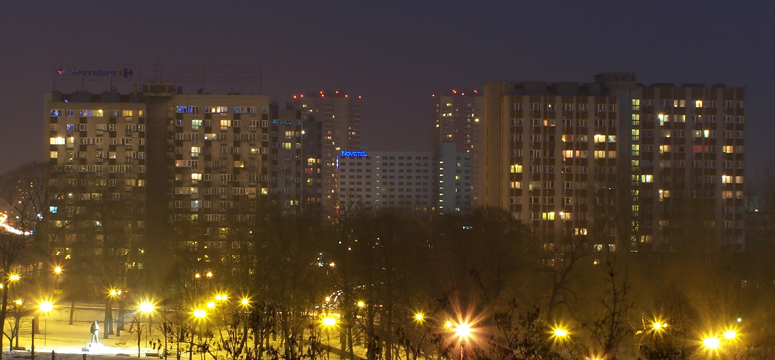 Katowice nocą - tzw. "dolarowce" (budynki mieszkalne przy ul. Uniwersyteckiej), hotel Novotel i osiedle "Gwiazdy" (w tle).